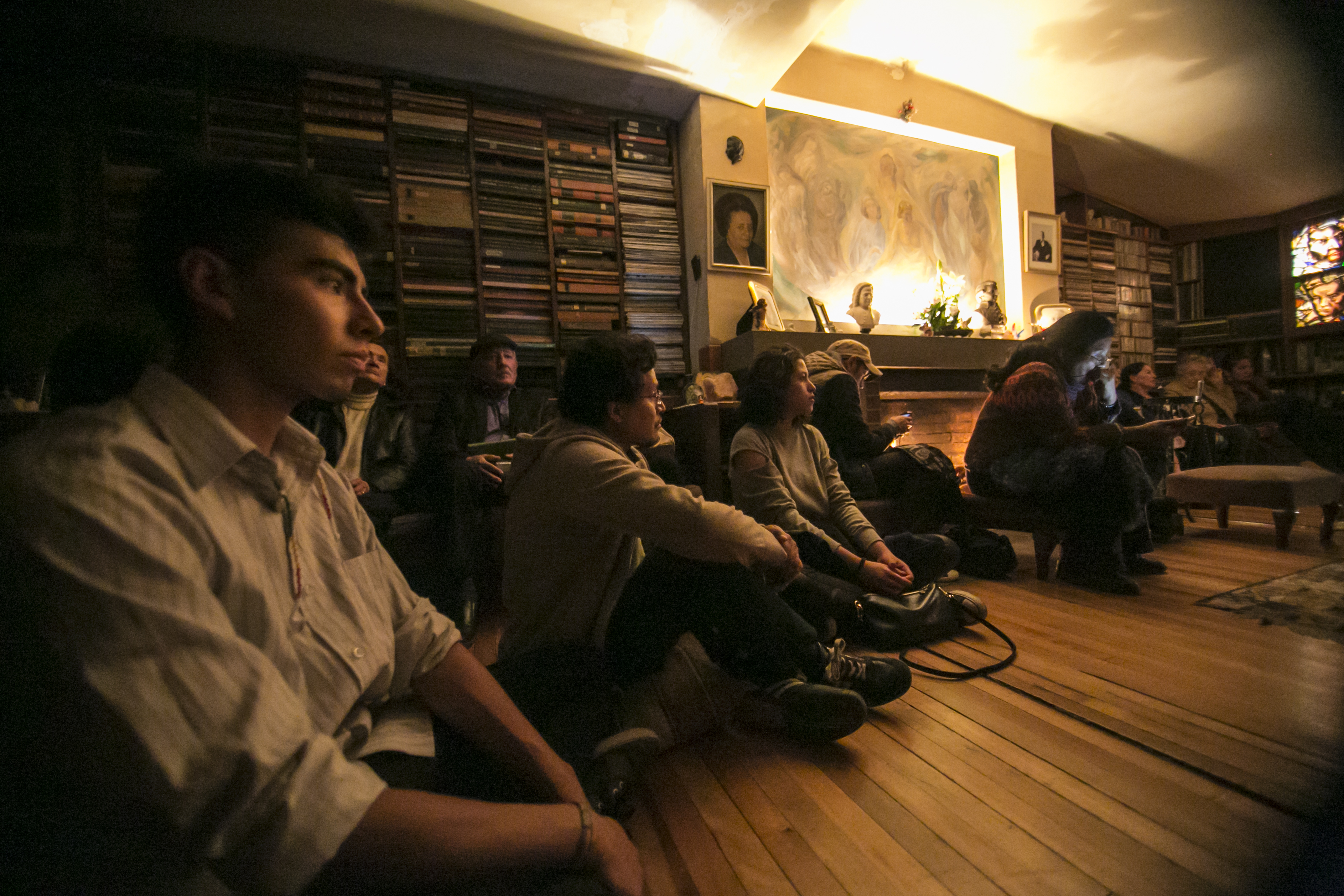 Salón de las Flaviadas. Fotografía de Gabriel Derri